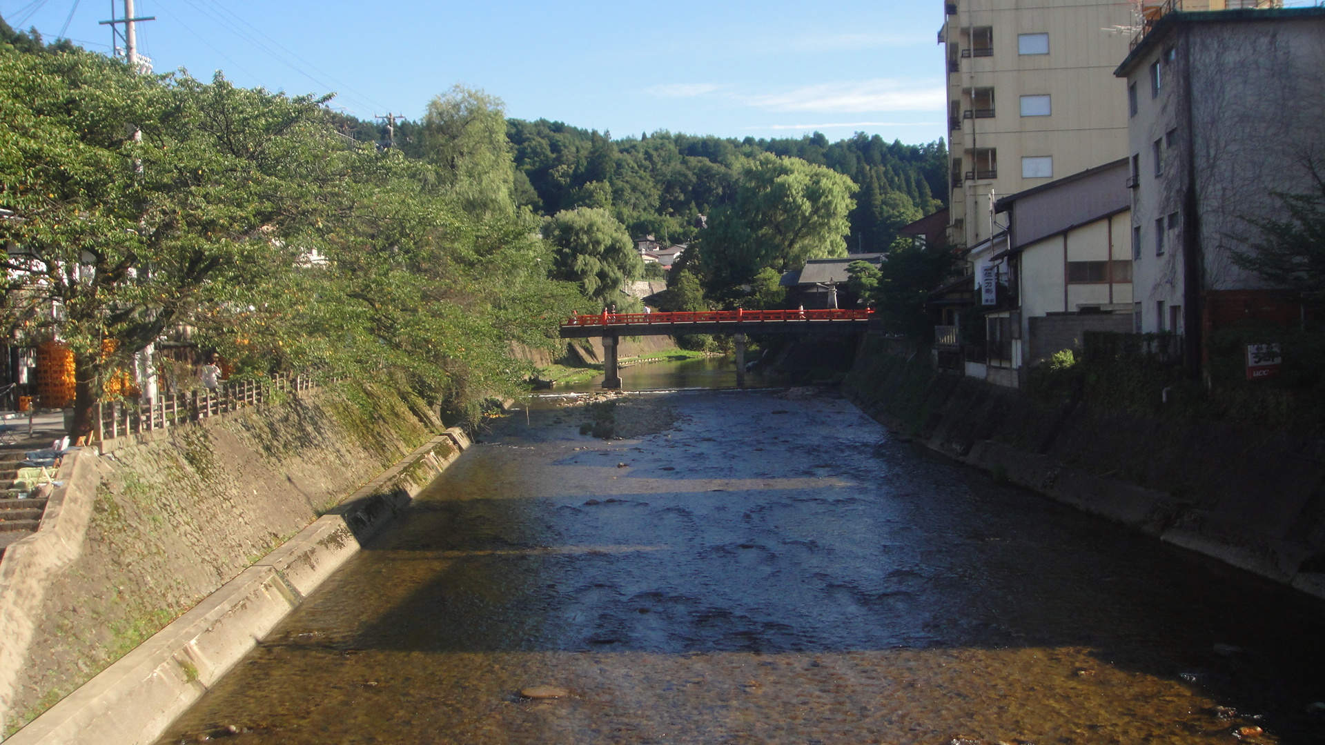 岐阜県高山市の宮川と中橋